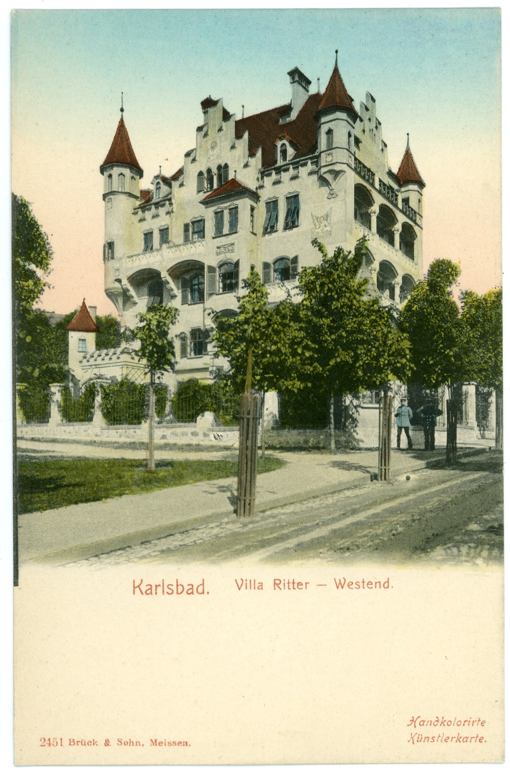 Karlsbad; Villa Ritter, Westend. Krále Jiřího 991/1. This postcard is from publisher Brück & Sohn in Meißen ( This postcard has a unique number 02451 and is available in a higher resolution at the publisher. This images was uploaded in a cooperation project between Wikipedians and the publisher.